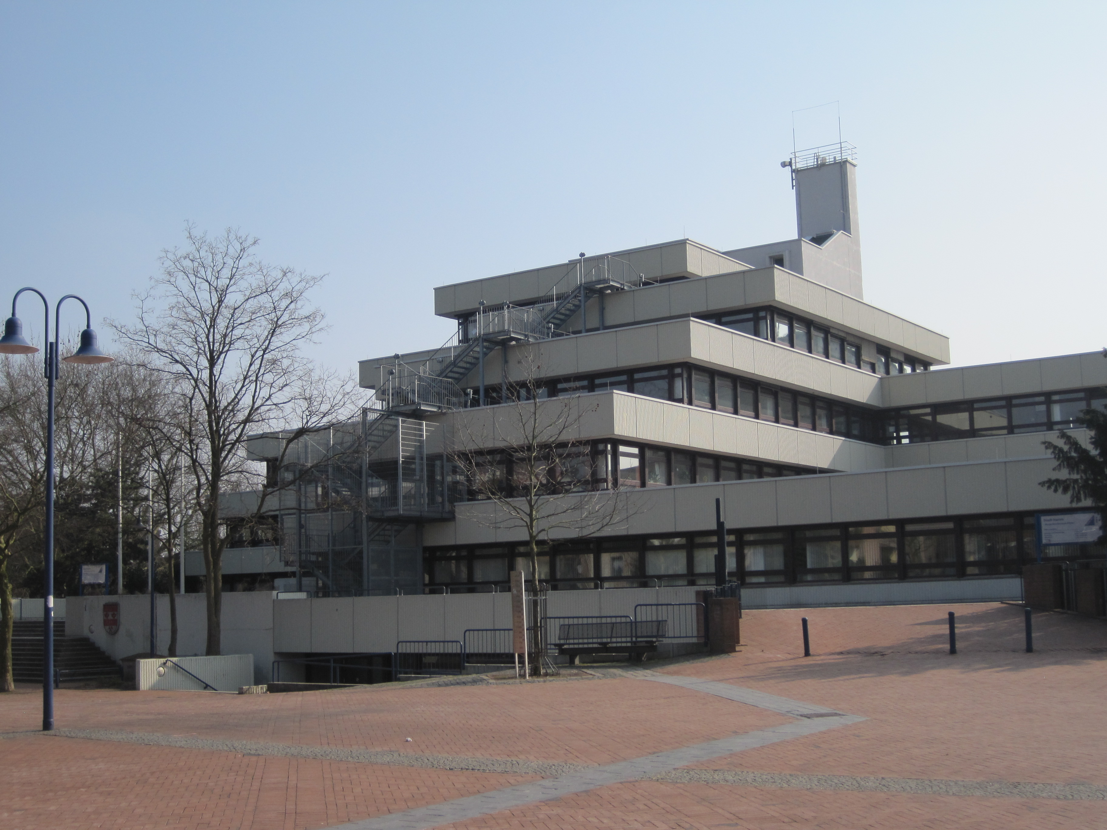 Das Foto zeigt das Rathaus Bockum-Hövel mit Blick vom Marktplatz.